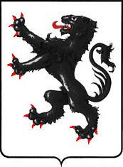 Stemma della famiglia Barbaran, appartenente al patriziato di Venezia.